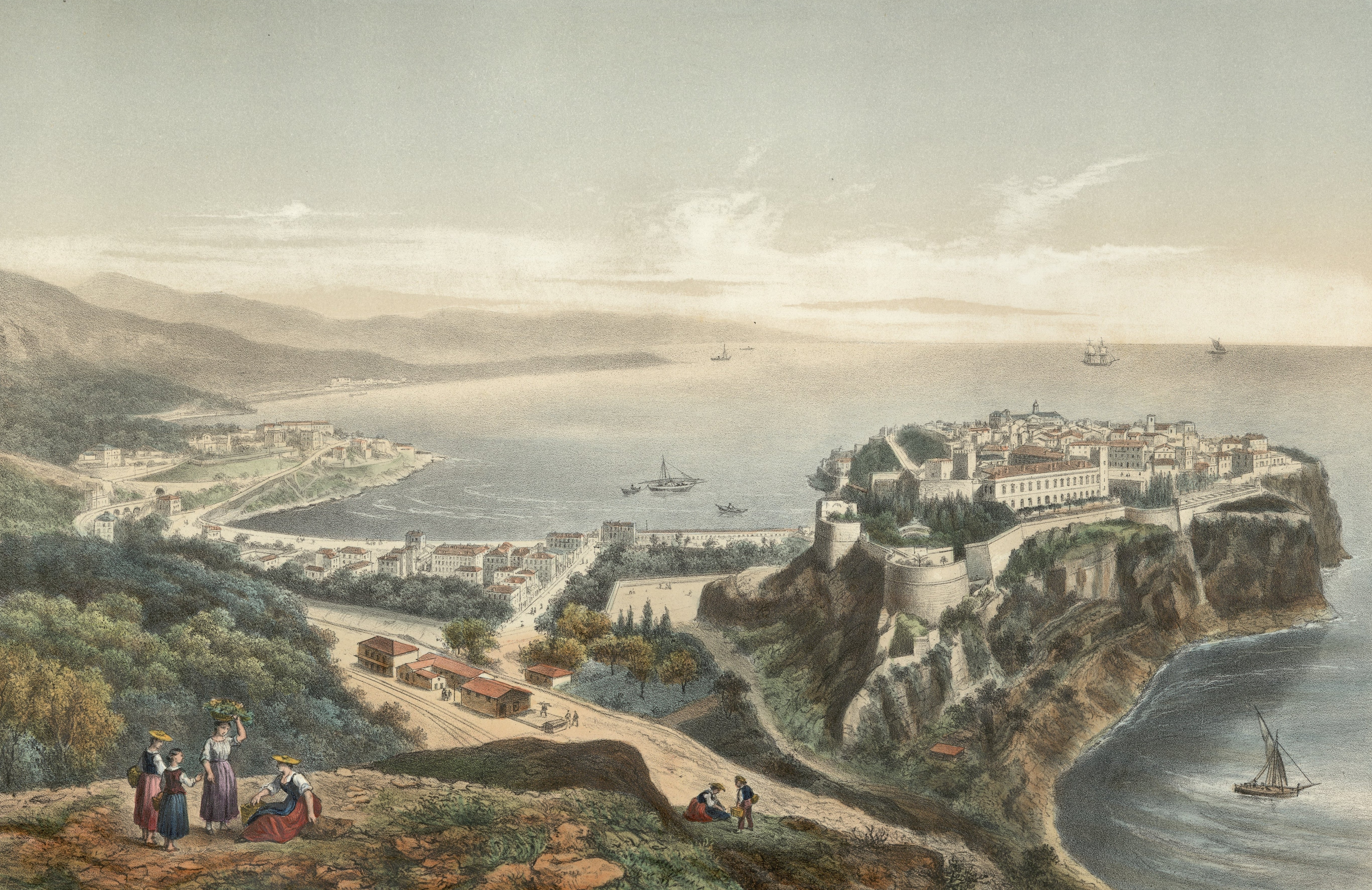 Estampe de Monaco prise de la gare du Chemin de fer.